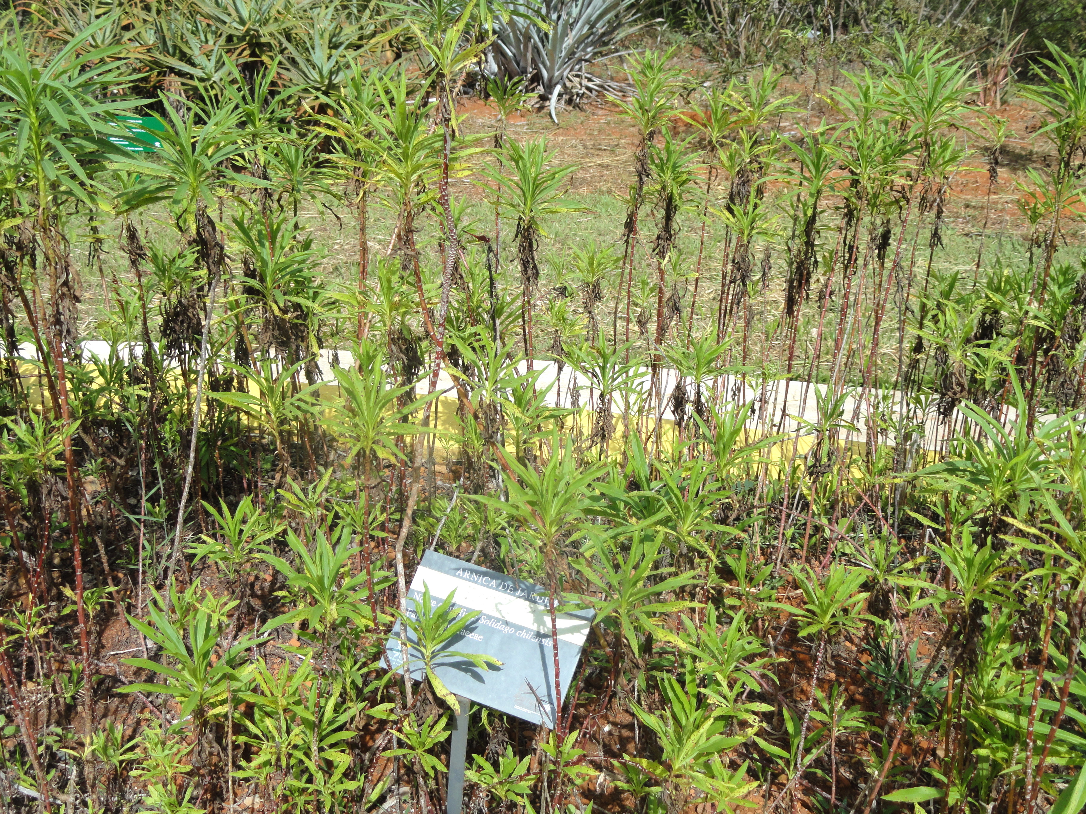 Solidago chilensis in the Jardim Botânico de Brasília, Brasília, Brazil.